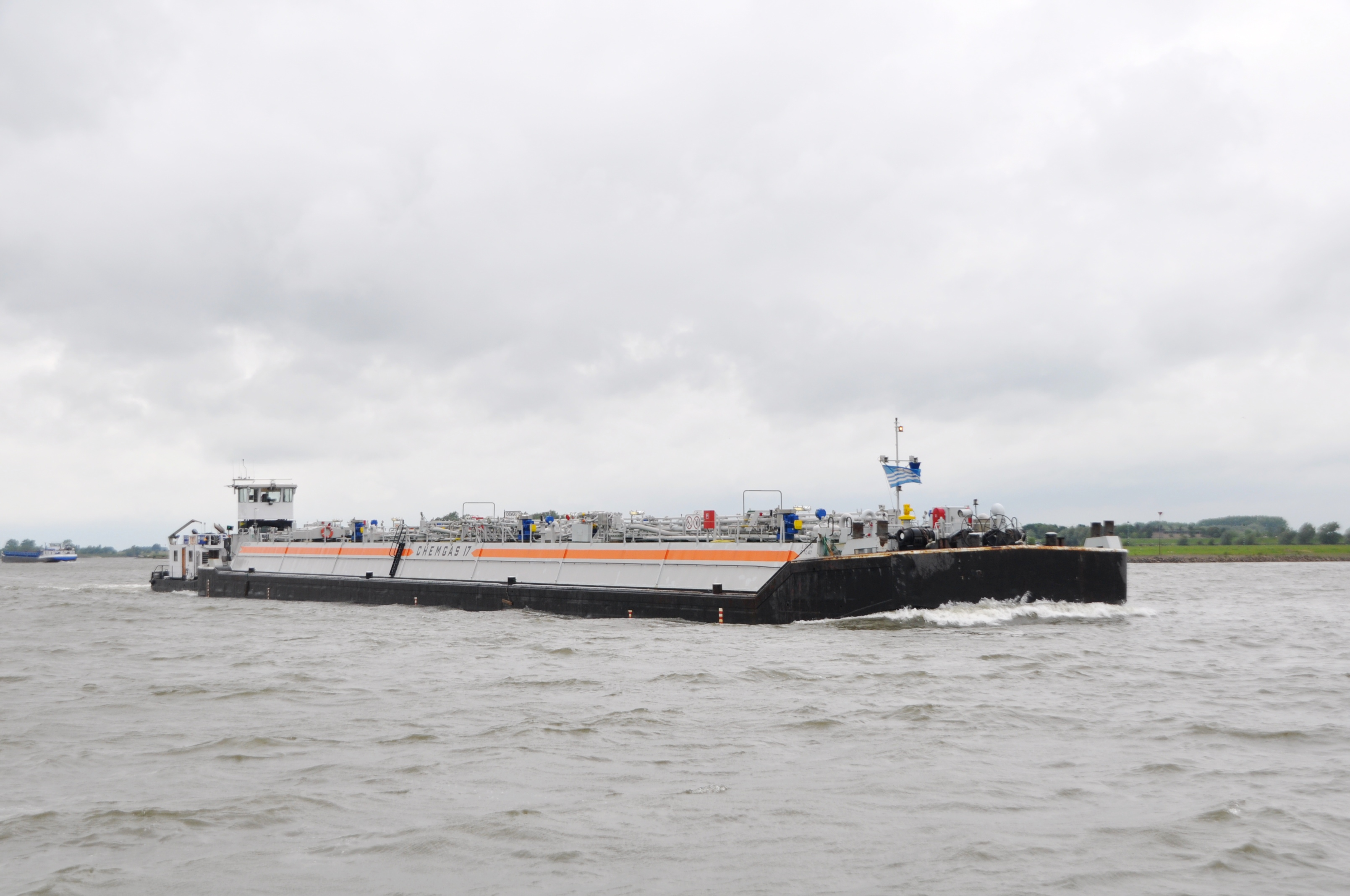 De SWIND opvarend op de Waal met de CHEMGAS 17 voor de kop